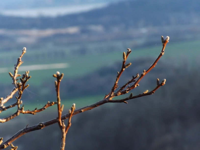 Dió rügyek a Káli-medence fölött, 2013 április